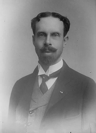 Frank Alvord Perret (1867 -1943), engineer, inventor and volcanologist